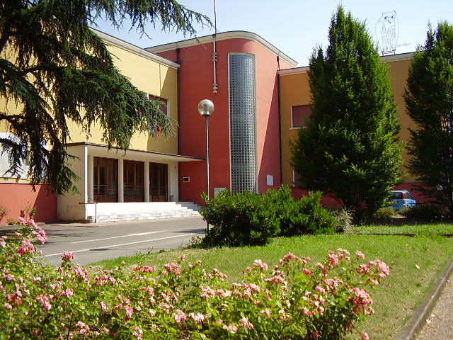 Fonte